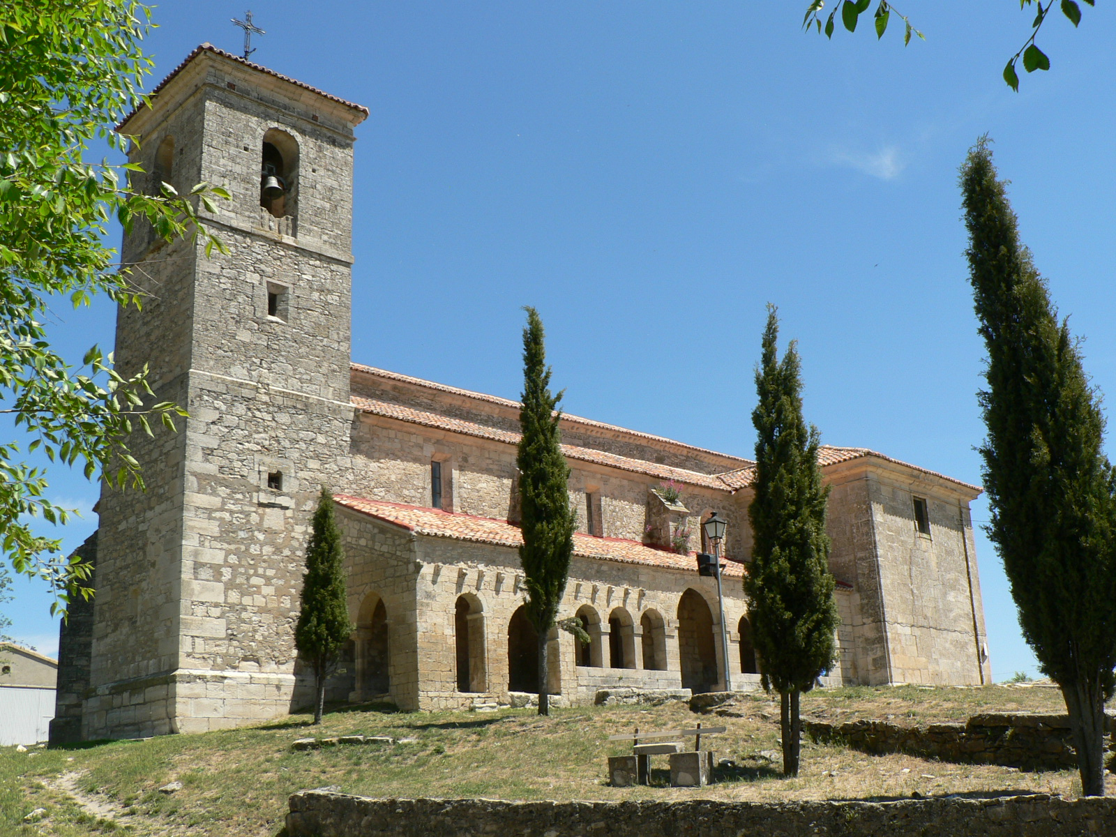 Iglesia románica del siglo XVI, en Tamajón, provincia de Guadalajara (España)